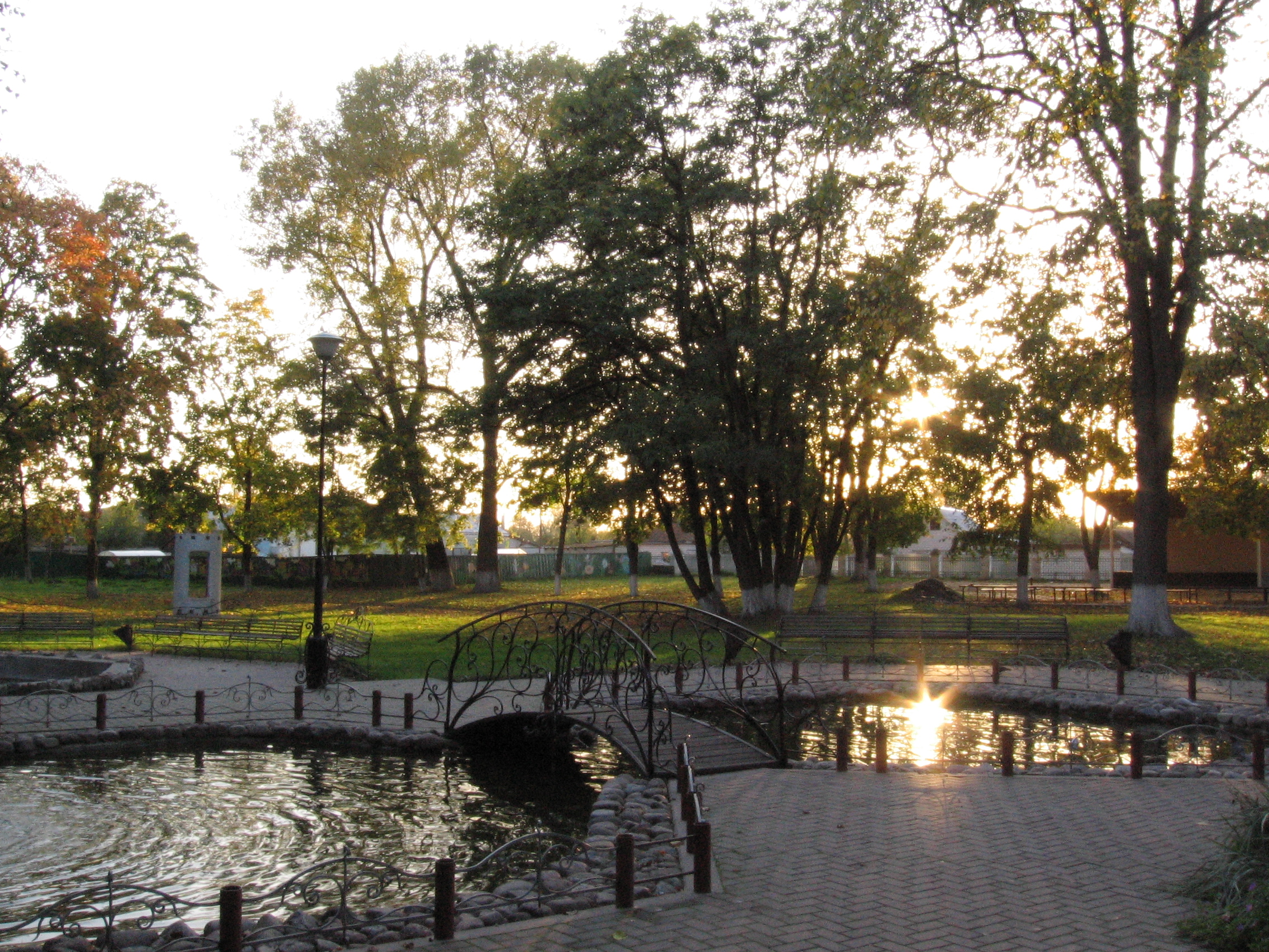 Без названия